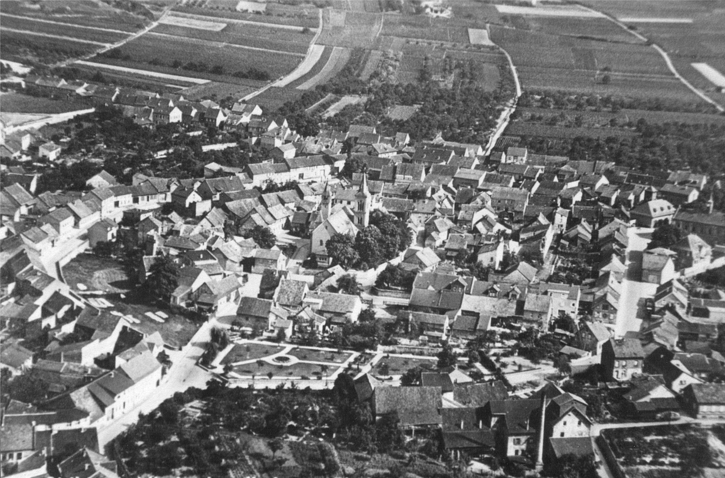 Luftaufnahme Nieder-Ingelheims aus den 1930er: Foto: Historischer Verein Ingelheim e.V. Mit Bestätigung des Historischen Vereins Ingelheims. Danke nochmal an dieser Stelle.